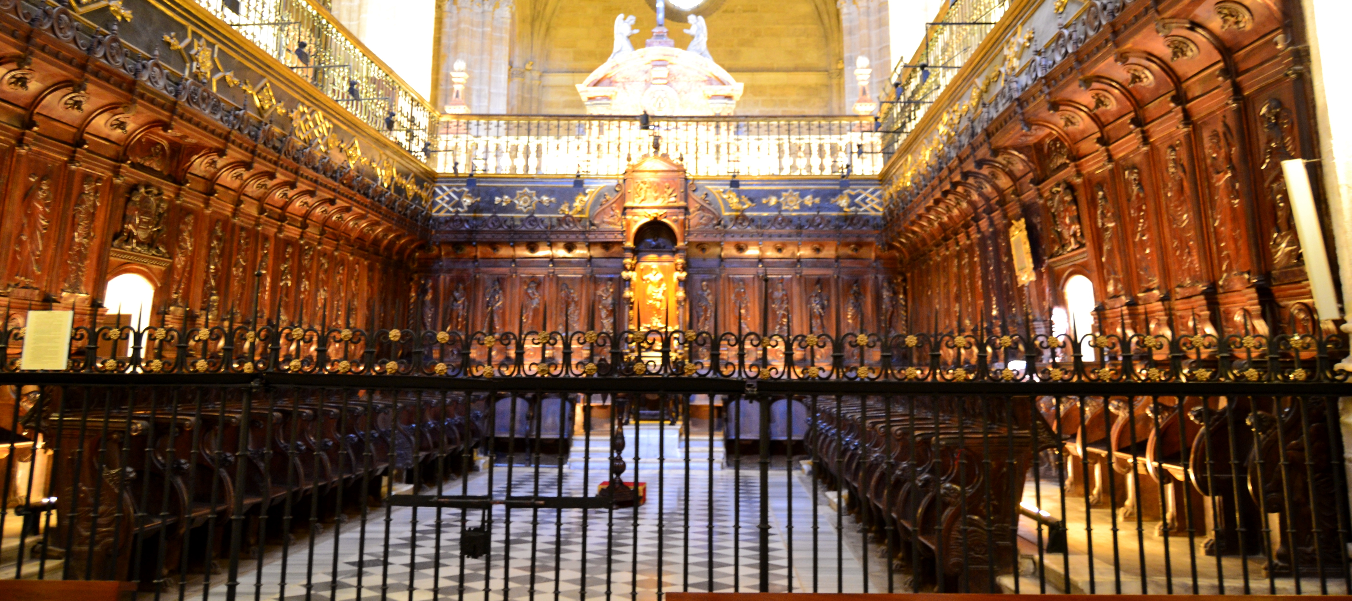 Retablo de la Catedral de Almería